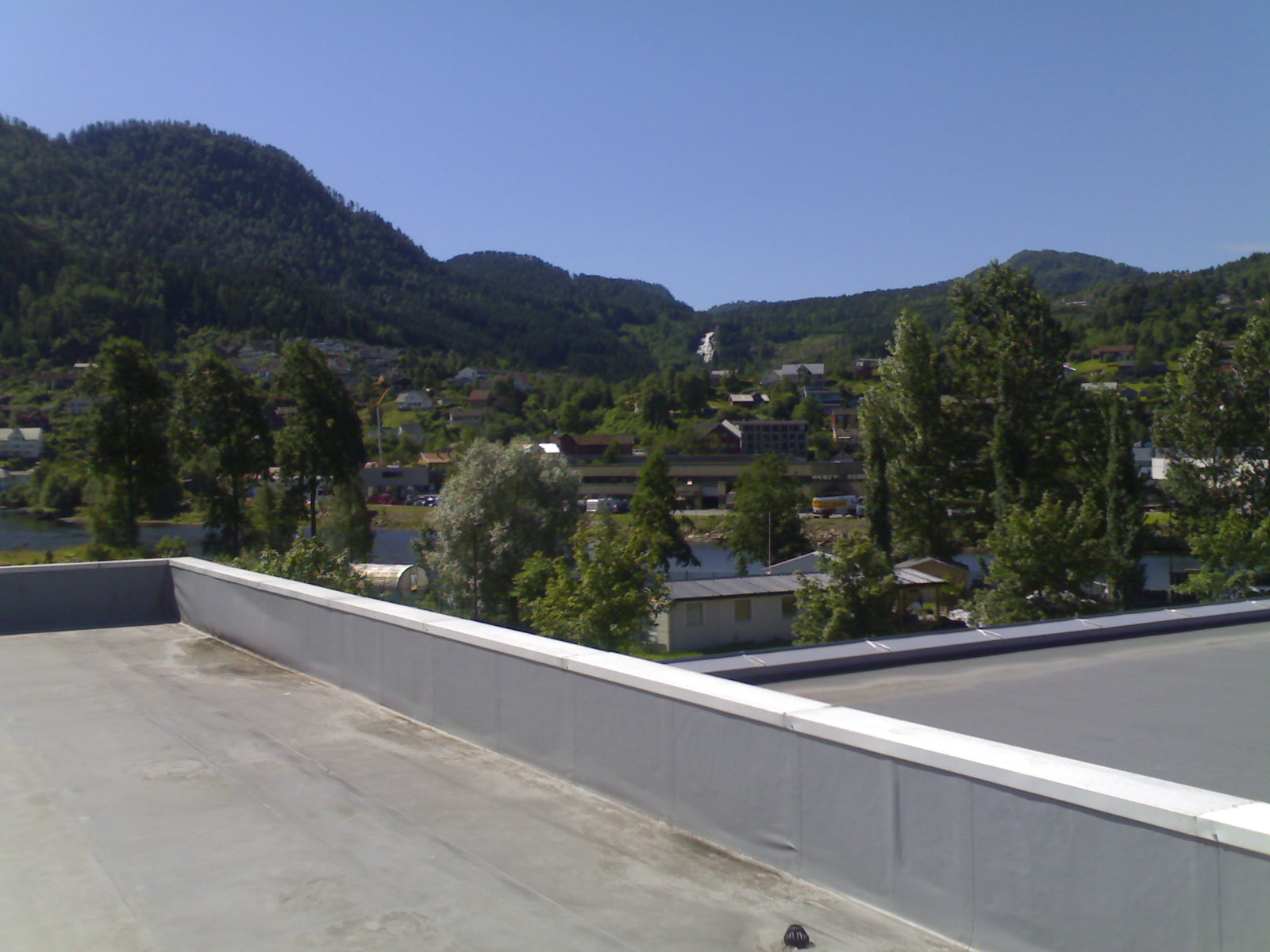 Bildet er sett fra Øyrane på vei inn over Flatene.